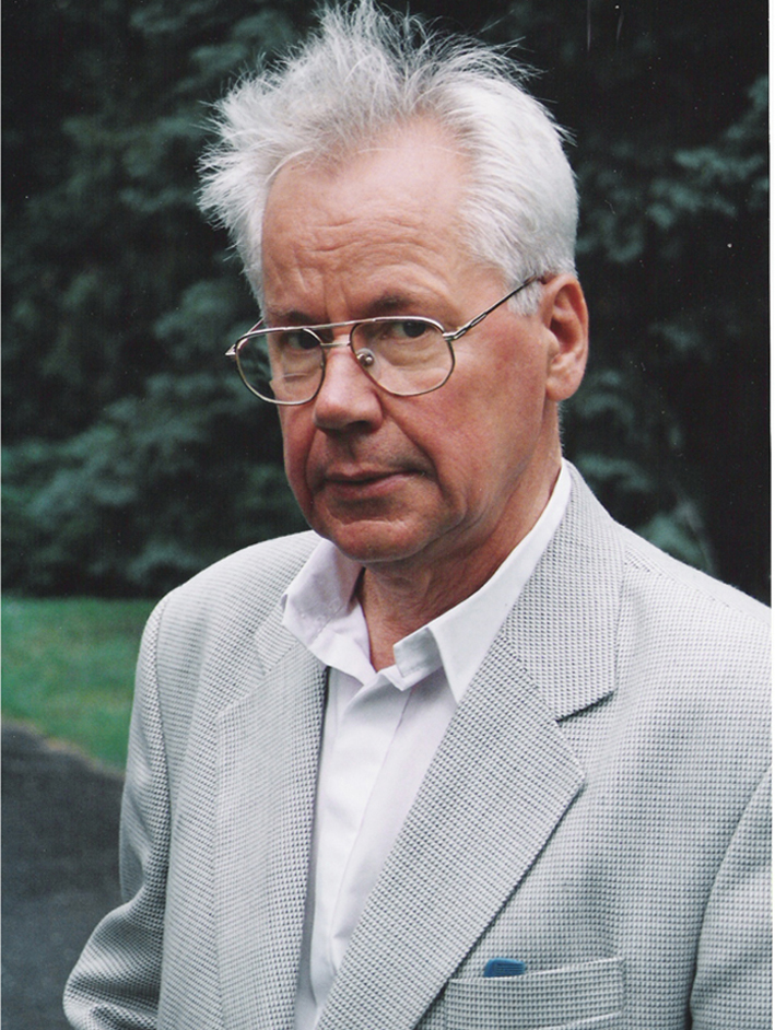 Zdjęcie zostało wykonane do Księgi Jubileuszowej, wydanej na siedemdziesiąte Urodziny prof. Jana Sucha.